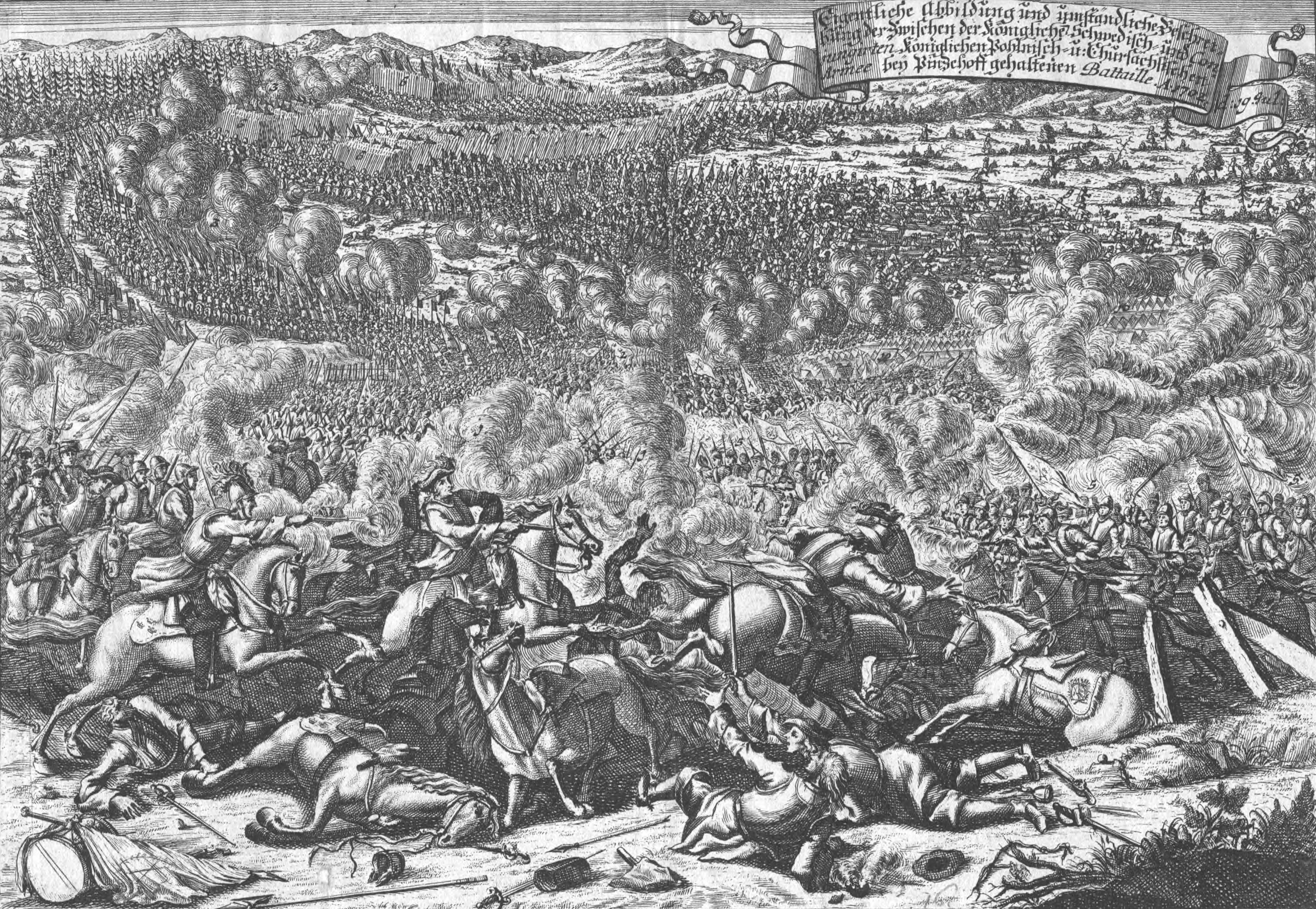 Kupferstich mit einer Darstellung der Schlacht bei Klissow zwischen Schweden und Sachsen am 19.7.1702, Druck von J. F. Leopold, Augsburg